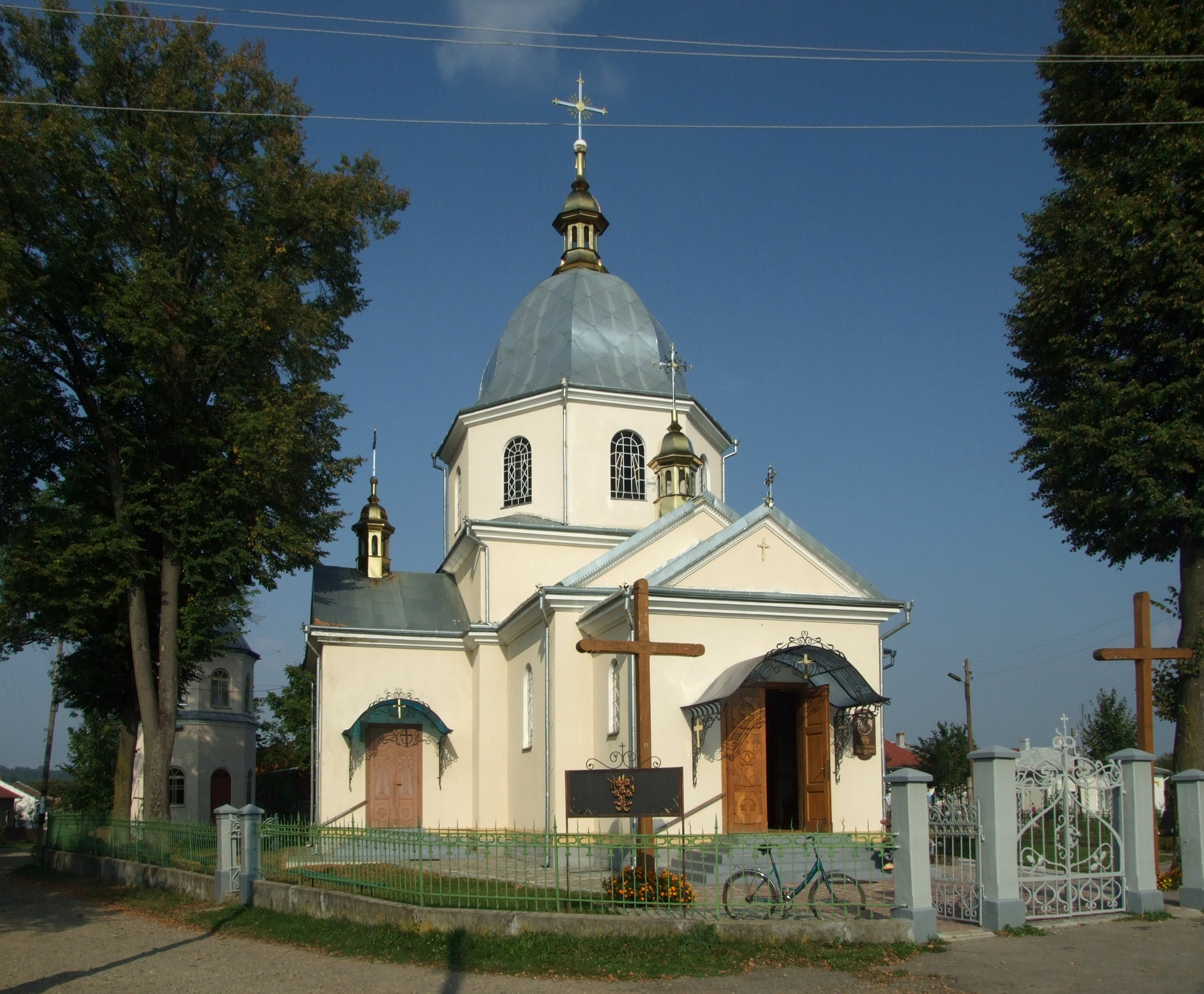 Церква св. Параскеви, 1860 р.